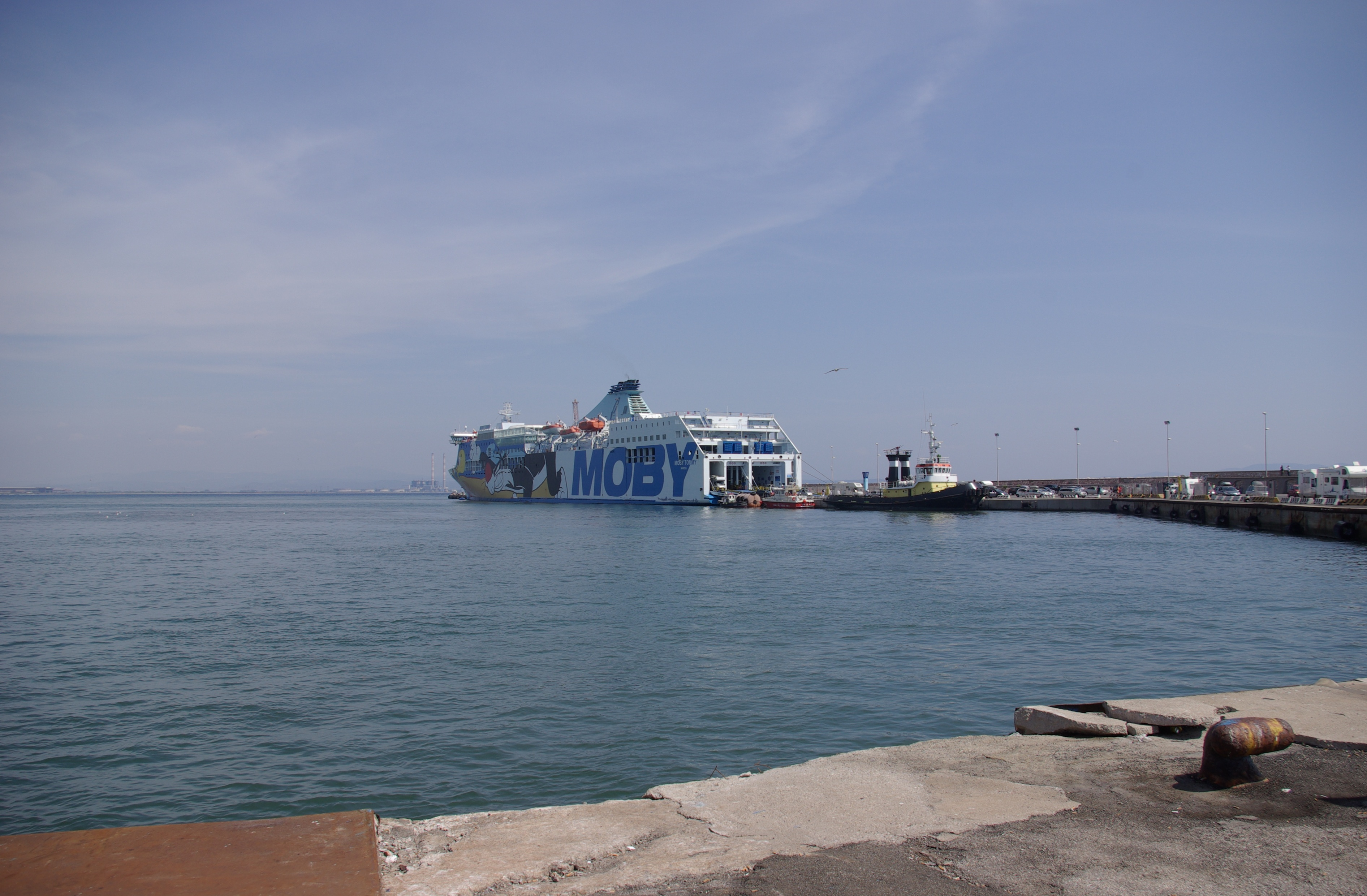 Die Fähre M/S Tommy von Moby Lines im Hafen von Piombino